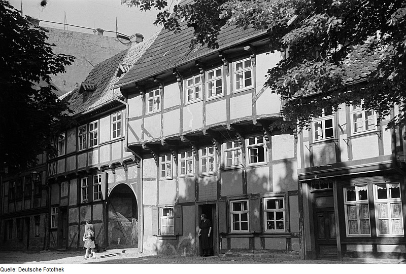 Original image description from the Deutsche Fotothek Ansicht Fachwerkhäuser in der Hohen Straße